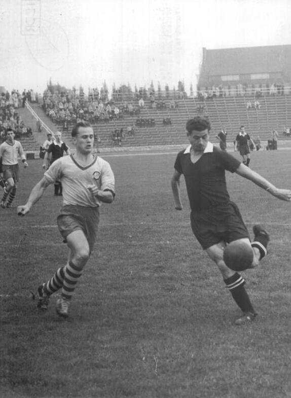 Zentralbild-Funck Ro-Eg. 25.9.1955 ZSK-Vorwärts Berlin - SC Wismut Karl-Marx-Stadt - Am 25. September 1955 fand im Friedrich-Ludwig-Jahn Sportpark in Berlin das Punktspiel zwischen den Oberliga-Mannschaften ZSK-Vorwärts-Berlin und SC Wismut Karl-Marx-Stadt statt. UBz: Der Mittelstürmer von Wismut, Tröger (rechts) schießt das 2. Tor für seine Mannschaft. (links) Marotzke (Vorwärts).